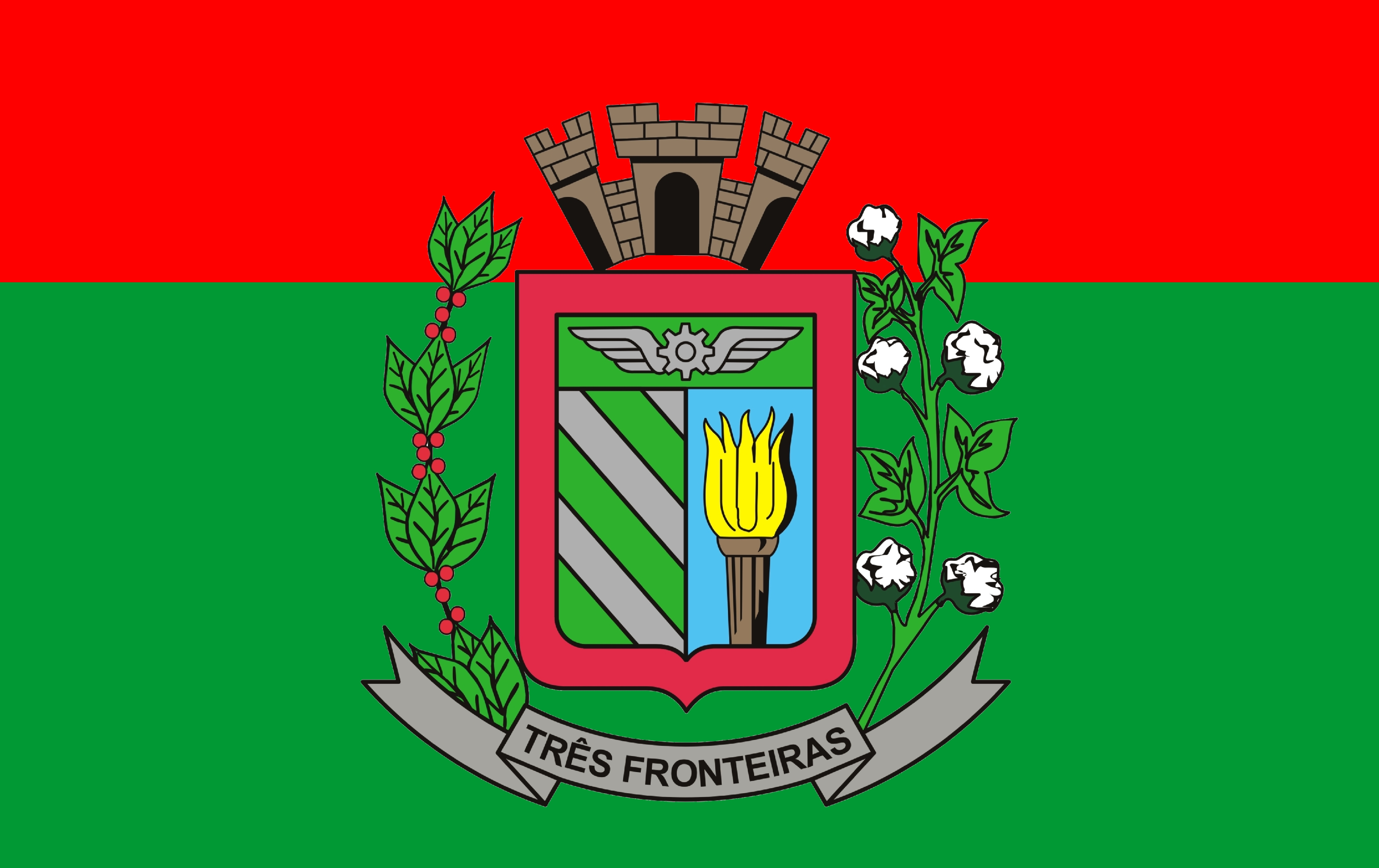 Bandeira do Município de Três Fronteiras